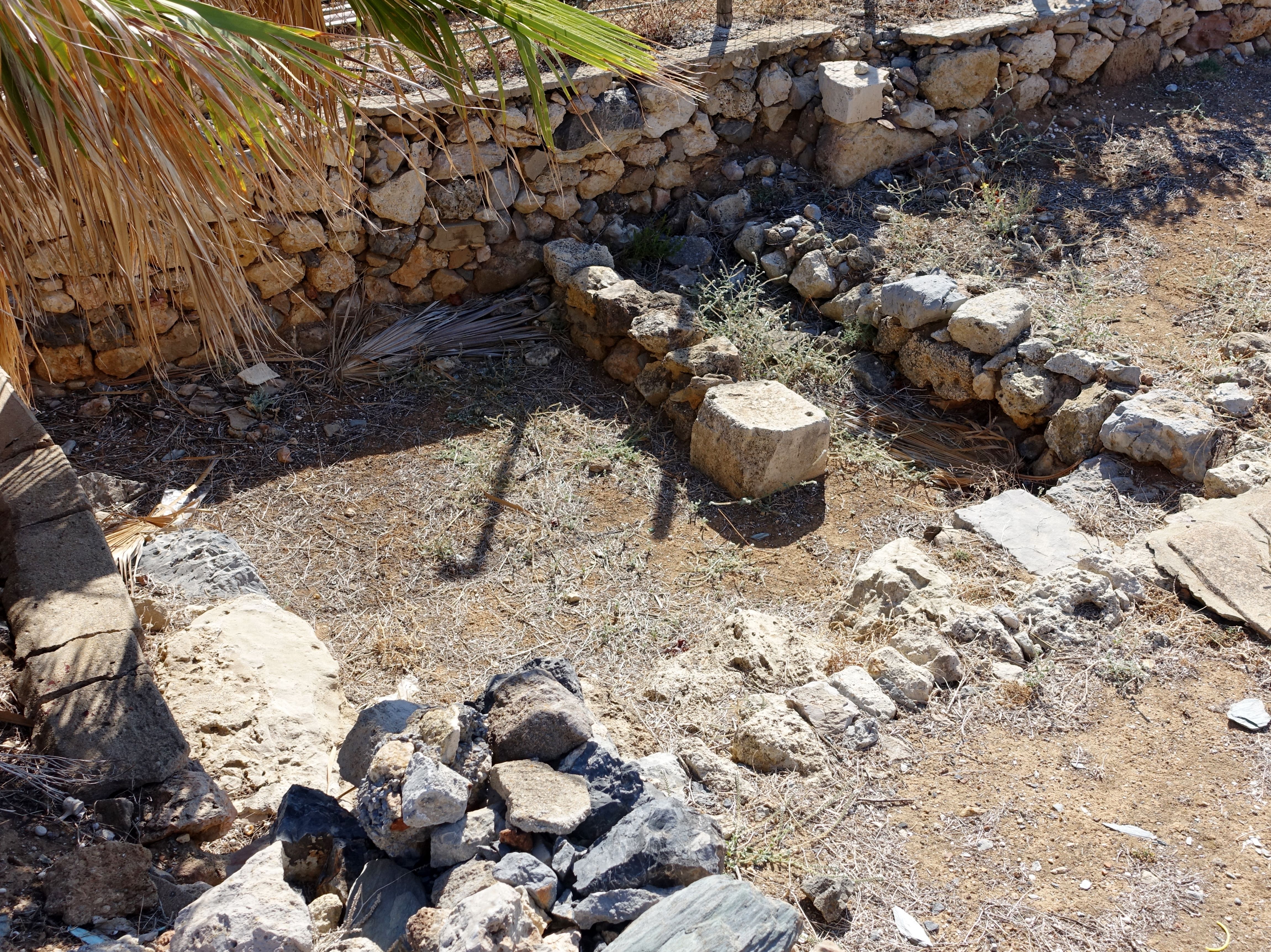 Minoische „Villa der Lilien“ in Amnissos bei Iraklio, Kreta, Griechenland